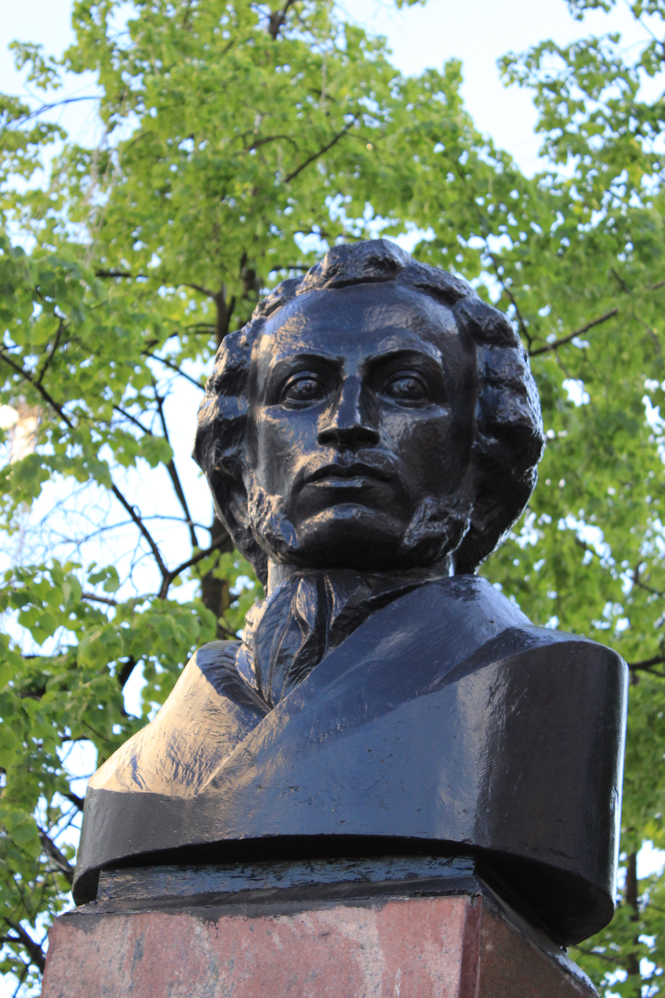 Памятник Пушкину в Вологде